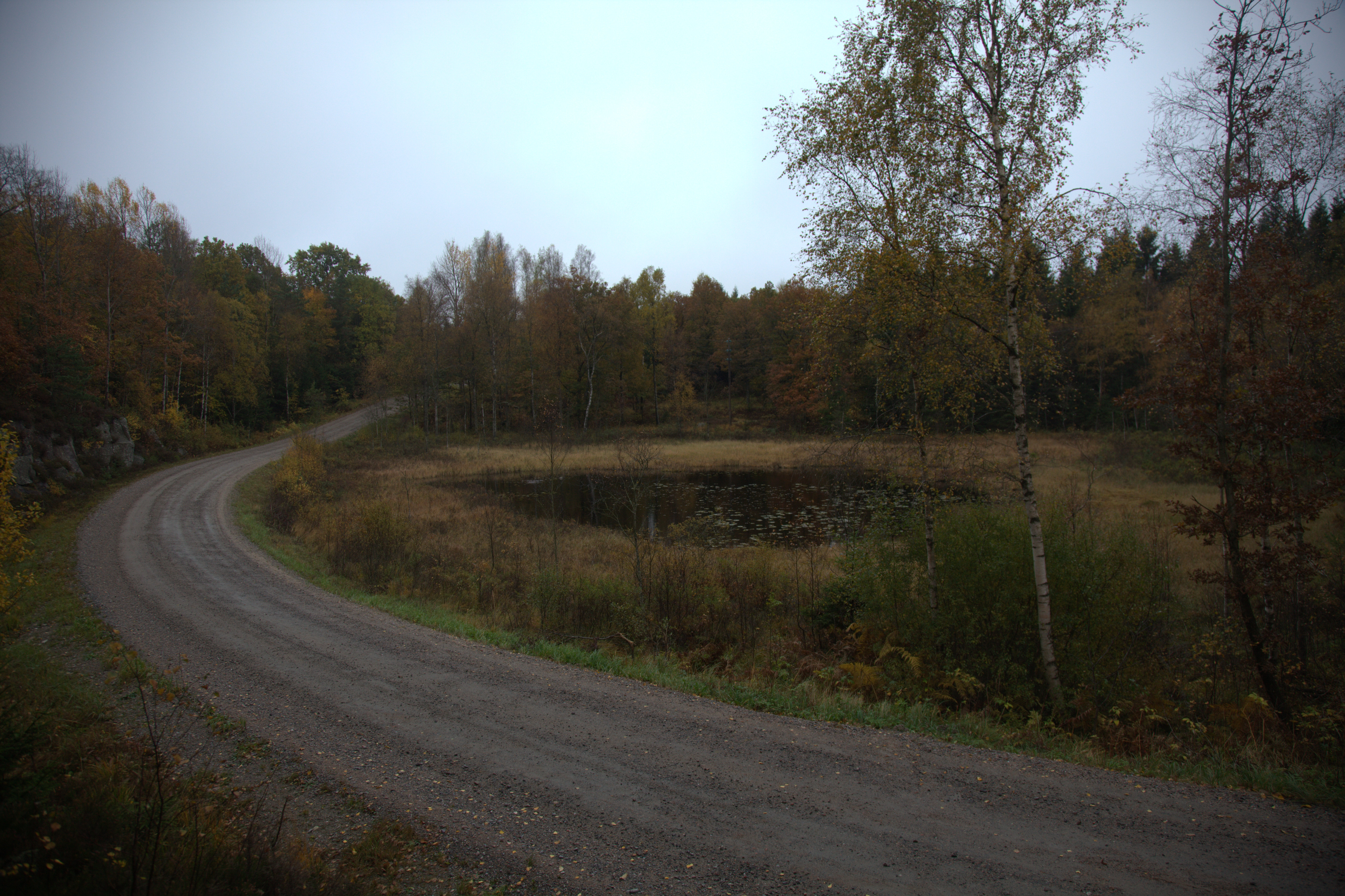 Åsesjön i Kungälv